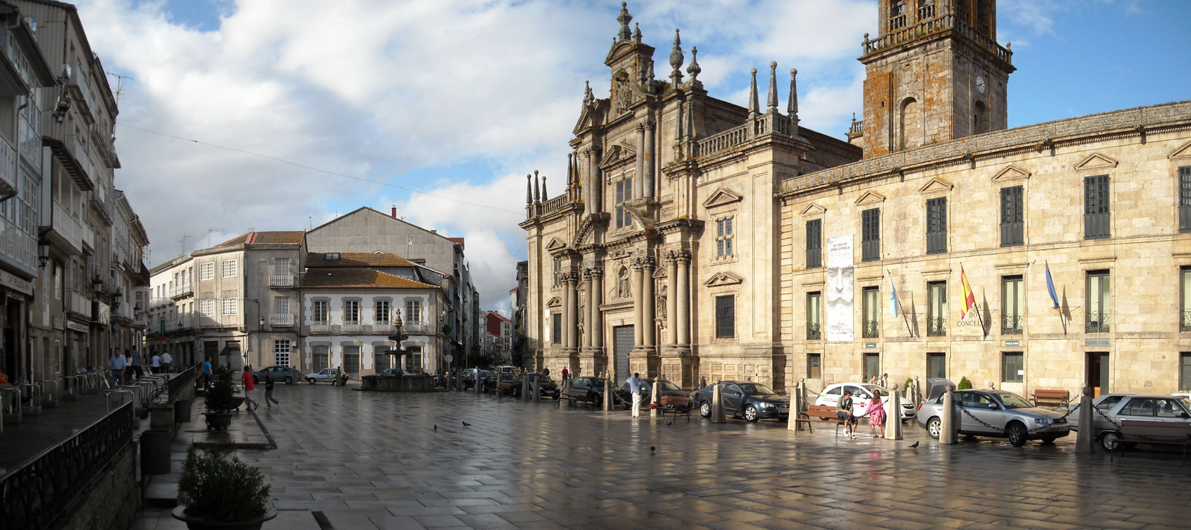 Praza Maior de Celanova e Fachada do Mosteiro e Igrexa.